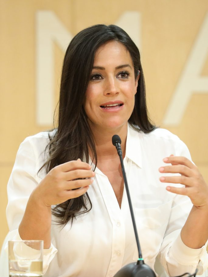 Martínez-Almeida preside su primera Junta de Gobierno de la ciudad de Madrid El alcalde ha delegado sus responsabilidades como presidente del Pleno Municipal en el concejal Borja Fanjul Fernández-Pita